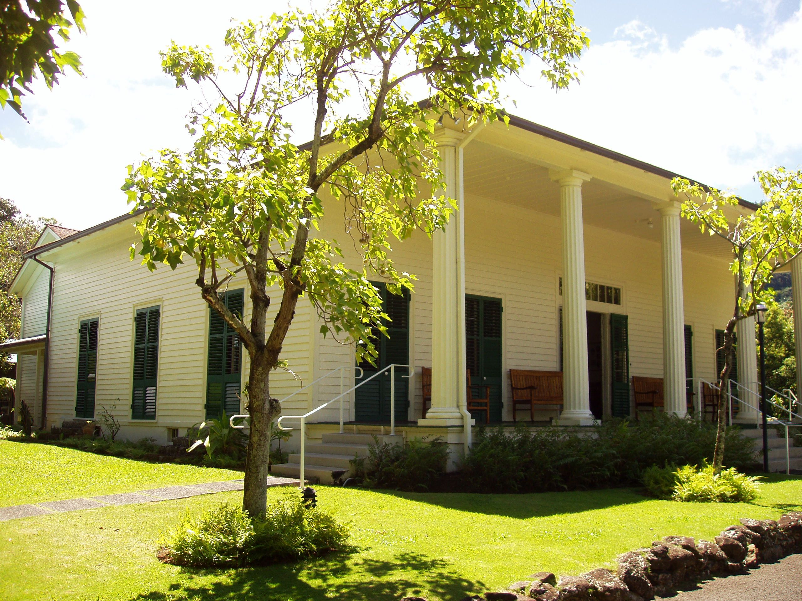 Queen Emma Summer Palace (Hanaiakamalama), Honolulu, Hawaii.